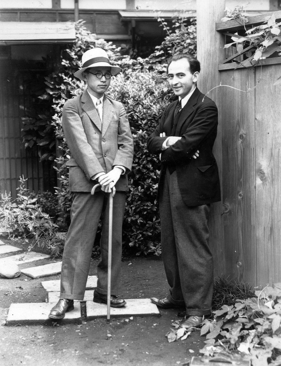 Der deutsche Kunsthistoriker und Journalist Albert Theile (rechts) mit dem japanischen Schriftsteller und Übersetzer Toshihiko Katayama (1898-1961) bei seinem Aufenthalt in Japan, 1940.